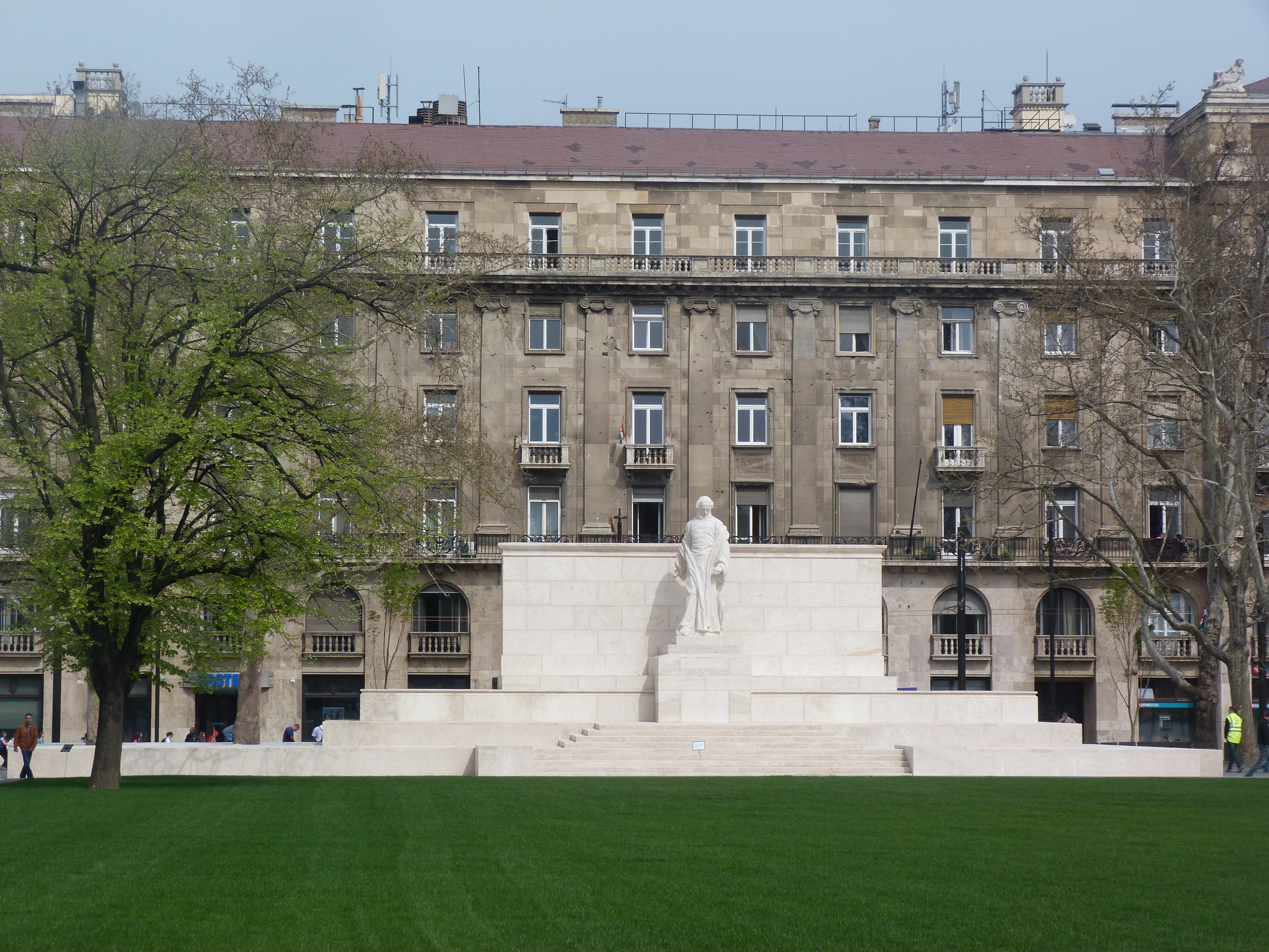 Budapest, Kossuth tér. Ajánlott hivatkozás: Derzsi Elekes Andor: Metapolisz DVD line